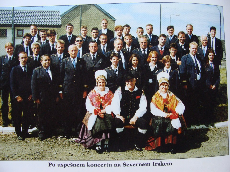 PIhalni orkester Bežigrad na turneji na Irskem leta 1996